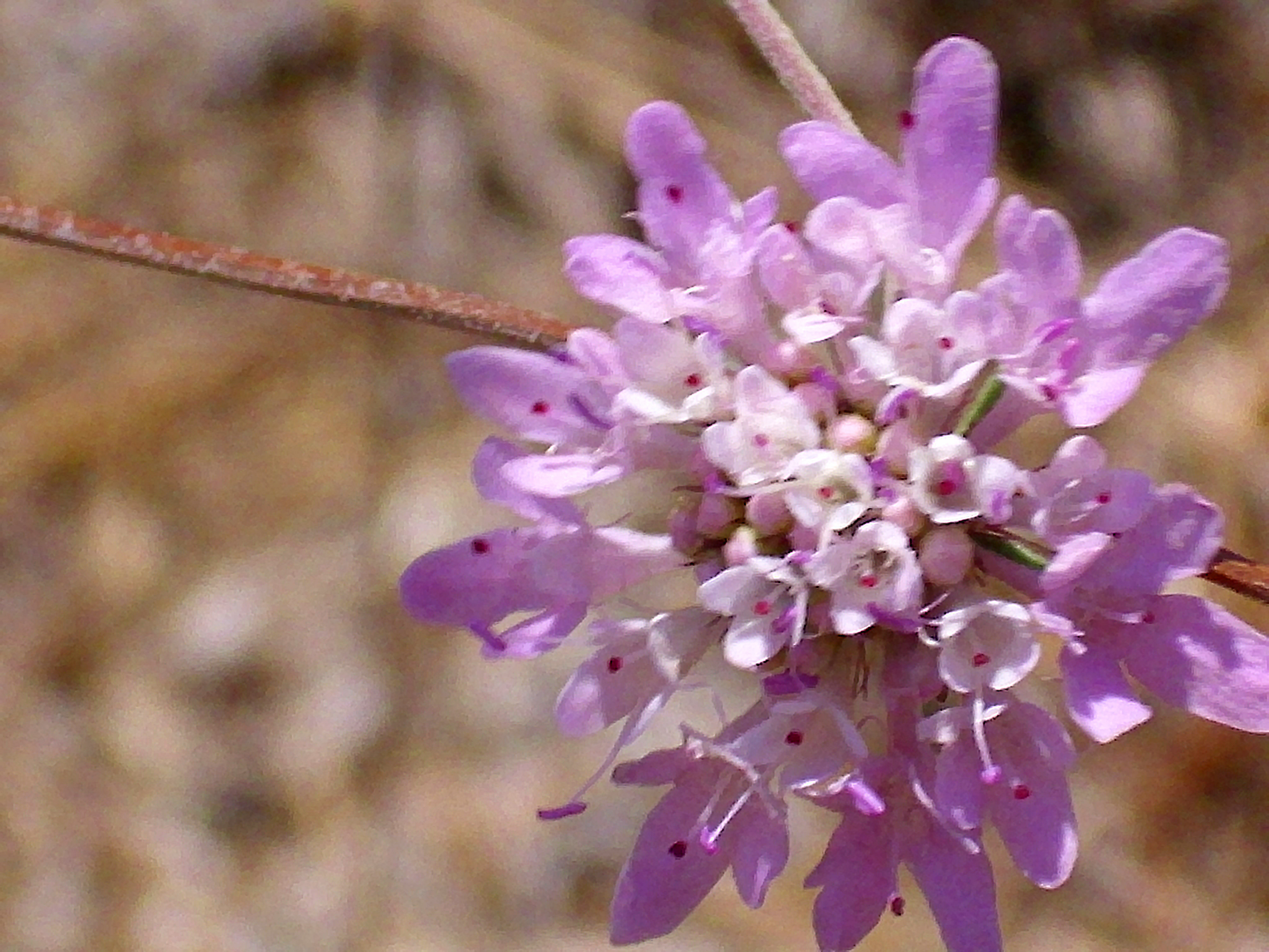 Scabiosa turolensis subsp. turolensis inflorescence close up, La Mata, Torrevieja, Alicante, Spain